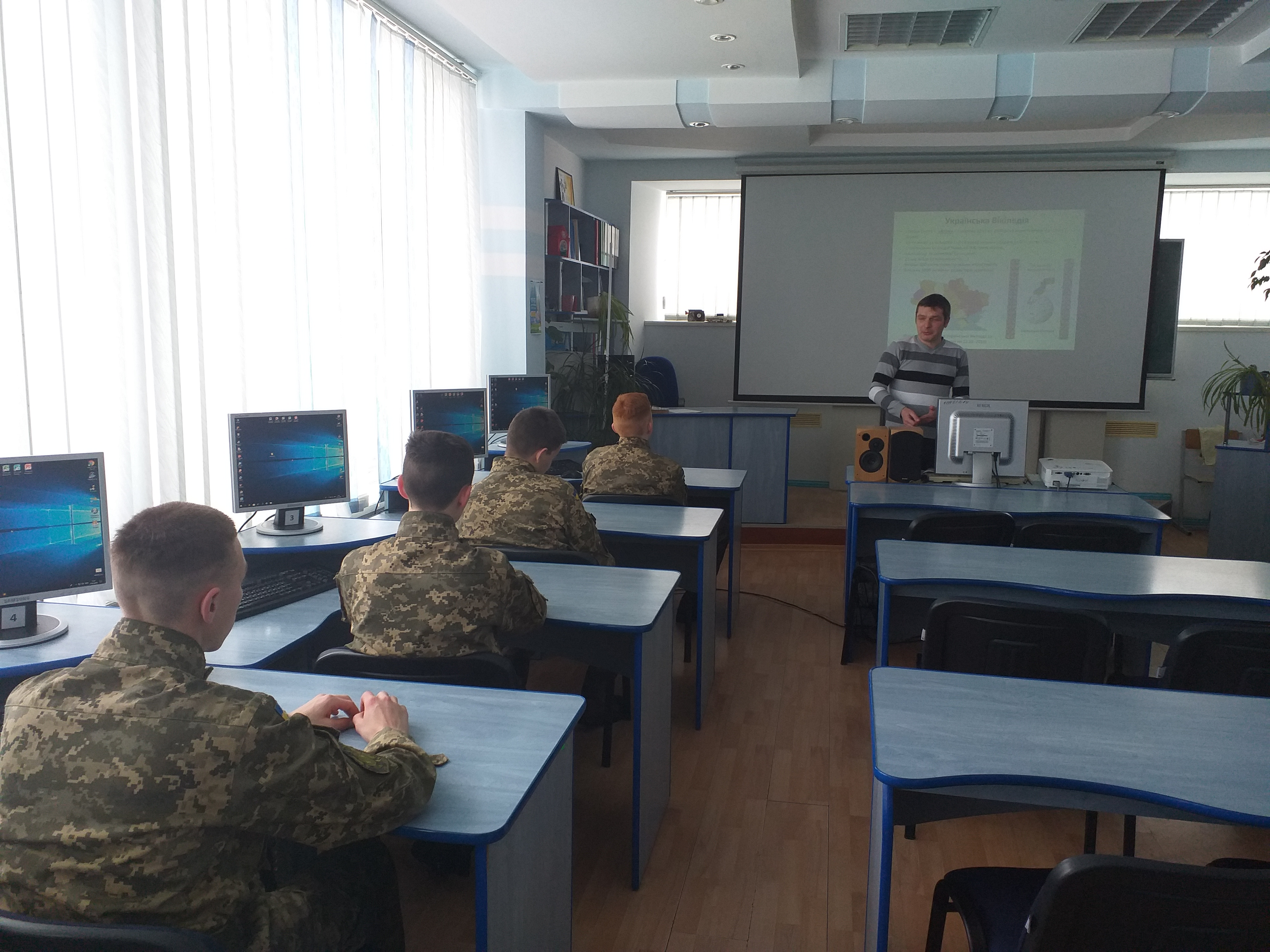 Вікімарафон у Кременчуцькому педагогічному коледжі імені А. С. Макаренка (27.01.2019)